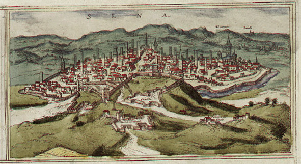 Siena